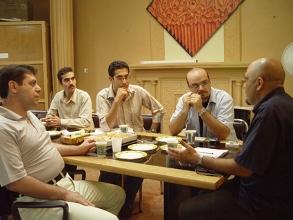 توکا نیستانی ، حسن کریم زاده ، مهرداد شیخانی ، احمدی غلامی مهر آبادی